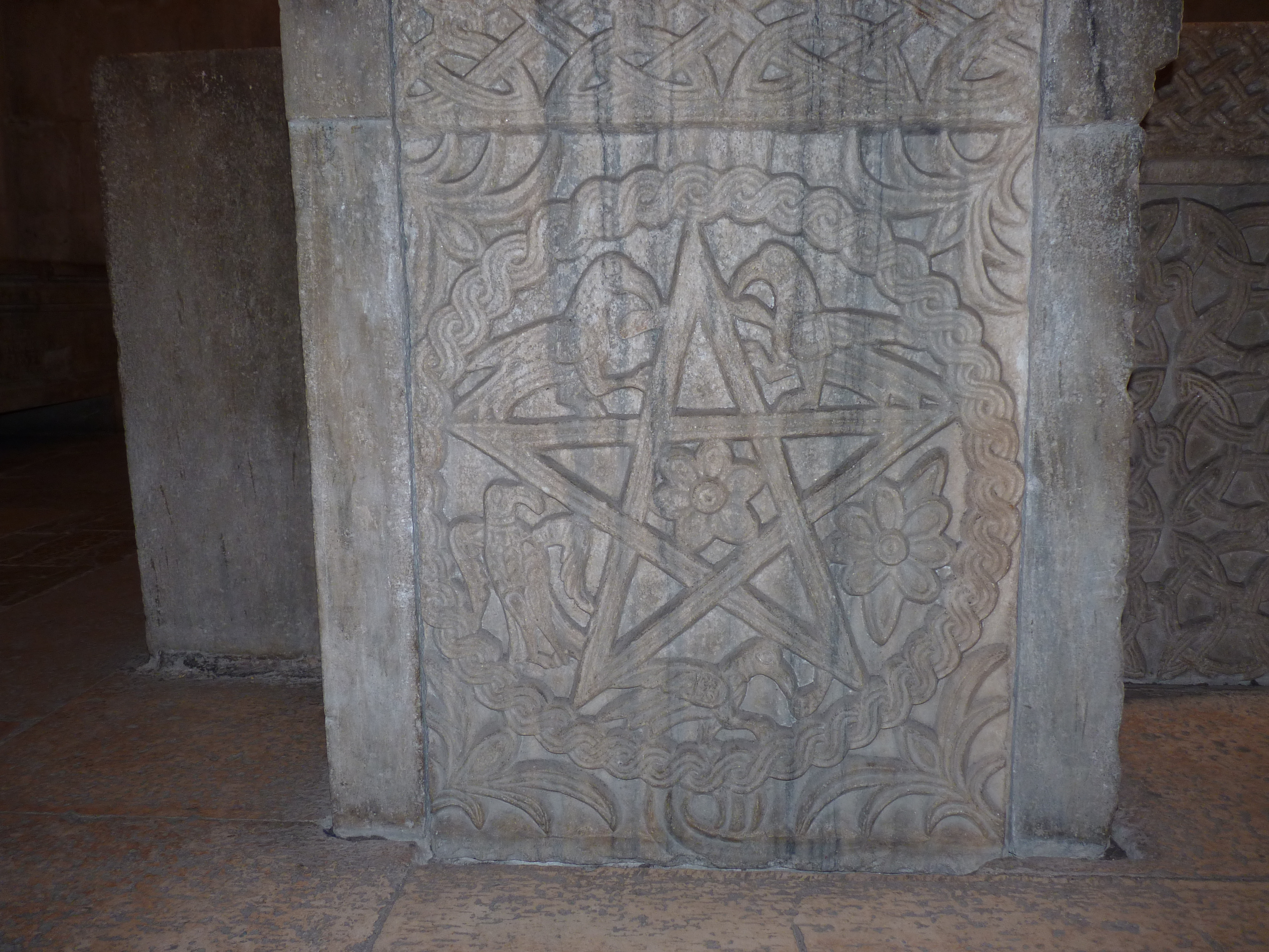 Cette partie de baptistère situé à Split (Croatie) date des premiers siècles de l'ère Chrétienne et comporte un pentacle ou pentagramme